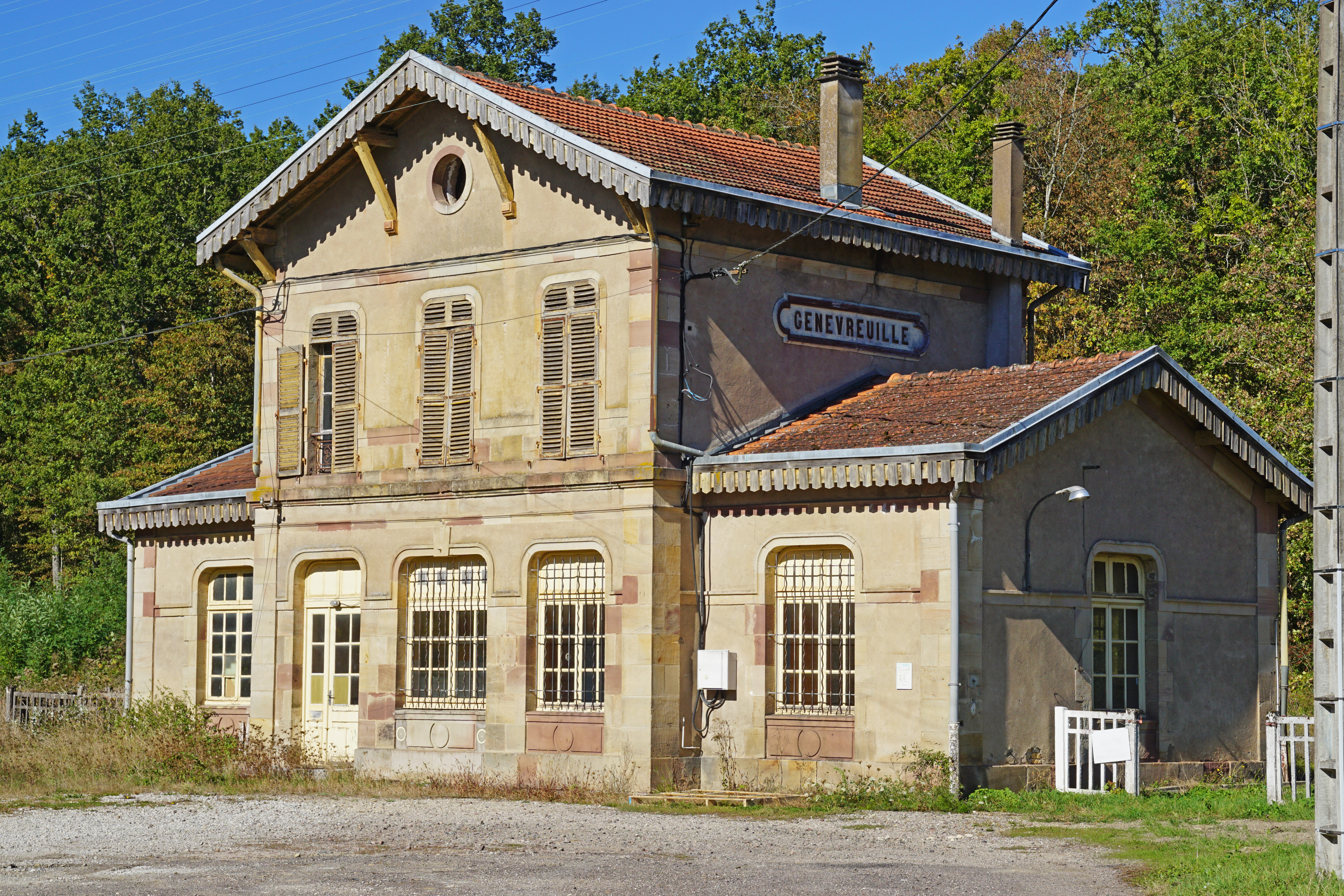 Le bâtiment désaffecté de la gare de Genevreuille.